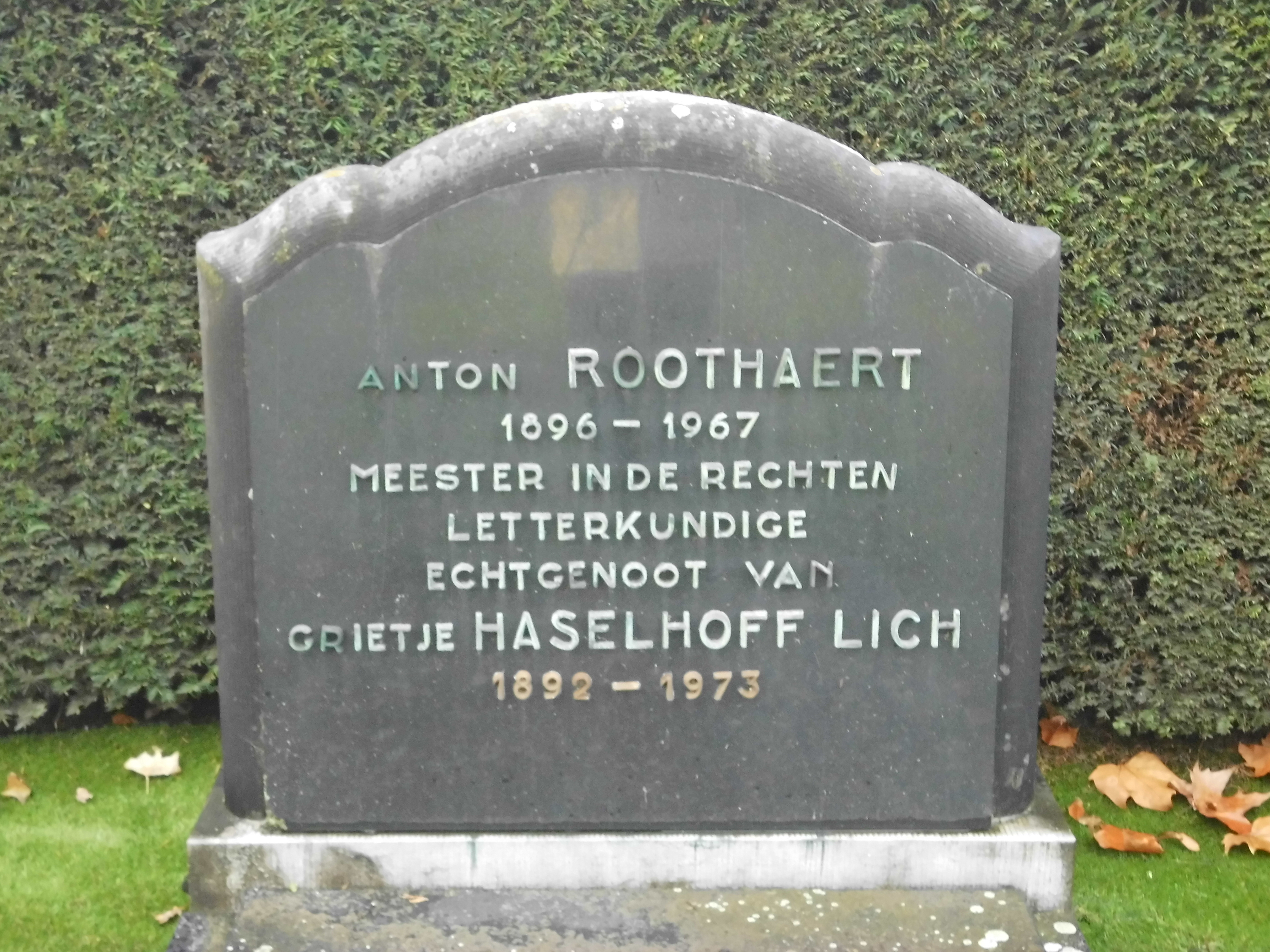 In feite geen foto van betrokkene, maar wel zijn grafsteen op de begraafplaats Ruggeveld Deurne, district van Antwerpen, België